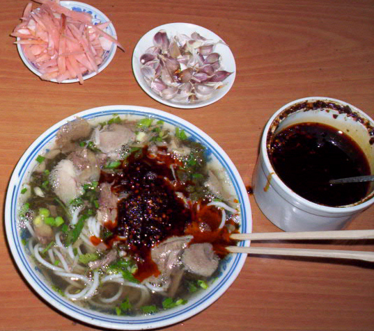 中文（中国大陆）: 无